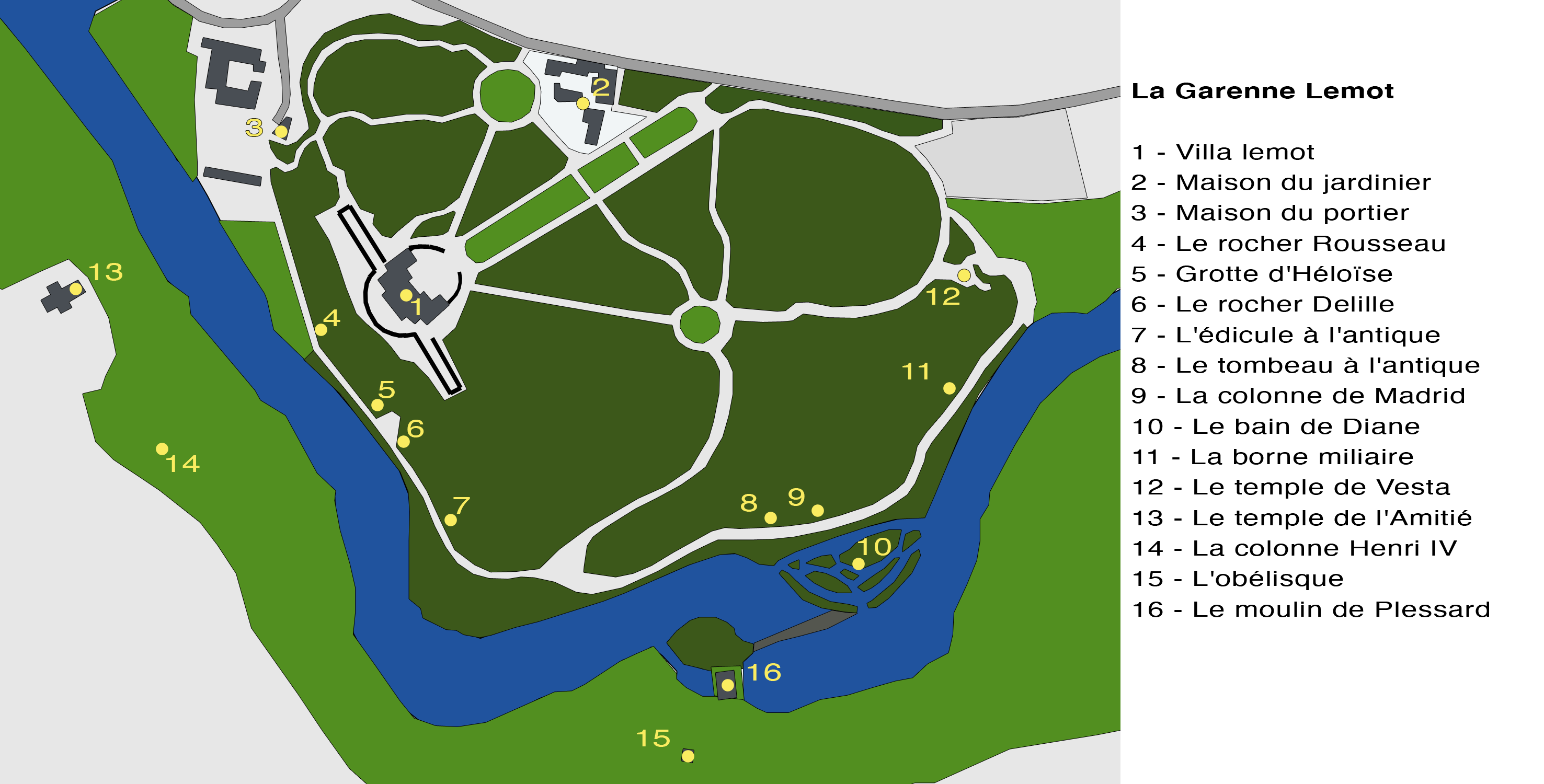 Plan du domaine de la Garenne Lemot (Gétigné, Clisson, Cugand). Légende : 1. Villa Lemot 2. Maison du jardinier 3. Maison du portier 4. La rocher Rousseau 5. Grotte d’Héloïse 6. Le roche Delille 7. L’édicule à l’antique 8. Le tombeau à l’antique 9. La colonne de Madrid 10. La bain de Diane 11. La borne militaire 12. Le temple de Vesta 13. Le temple de l’Amitié 14. La colonne Henri IV 15. L’obélisque 16. La moulin de Plessar